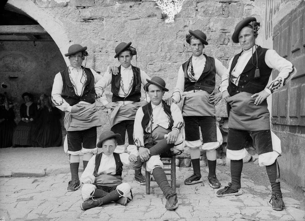 Imatge